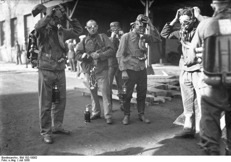 Zu der furchtbaren Bergwerks-Katastrophe in Neurode! Die Anzahl der Toten wird auf 150 geschätzt. Unsere Bilder zeigen Rettungsmannschaften aus dem Waldenburger Revier, welche bei den Bergungsarbeiten erste Hilfe leisteten. - Rettungsmannschaften beim Aufsetzen der Sauerstoffgeräte , fertig zur Rettung der Verunglückten.